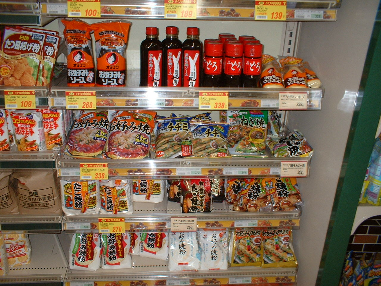 Okonomiyaki and takoyaki ingredients (お好み焼きとタコ焼きの材料)